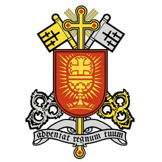 Logo der Liberal-Katholischen Kirche Deutschland